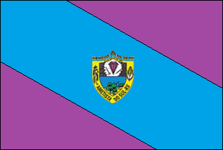 Português do Brasil: Bandeira Oficial de Ametista do Sul - RS, Brasil.